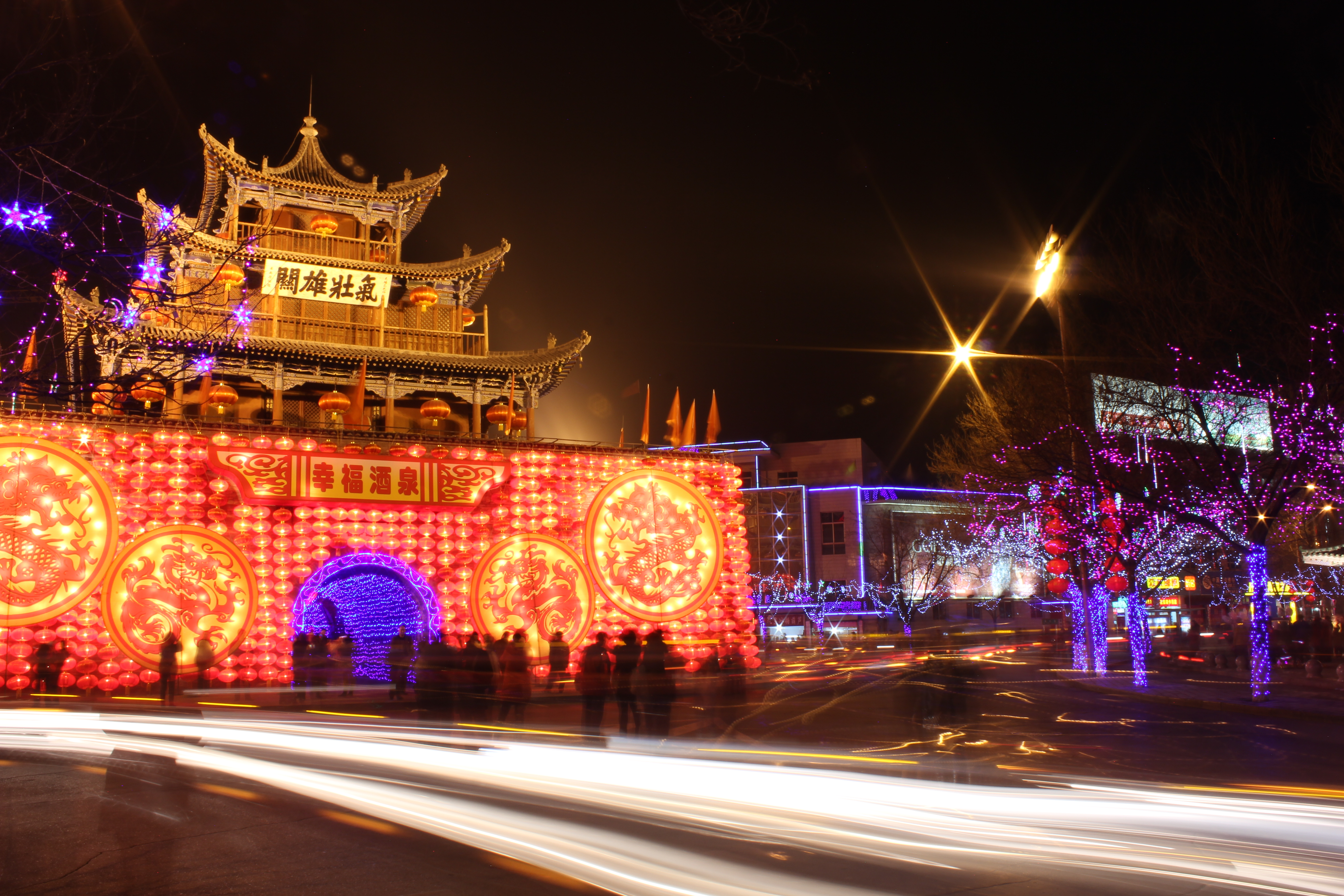 中国甘肃酒泉鼓楼